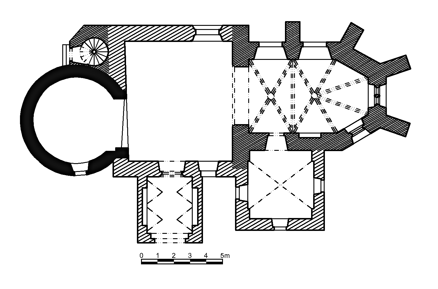 Kostel svatého Jiří s kaplí a farou, Hradešín. Půdorys podle: Radešín (Hradešín) - Děkanský kostel sv. Jiří, Soupis památek, 24. Politický okres českobrodský (1907), str. 136-142, cit dle: (2014)